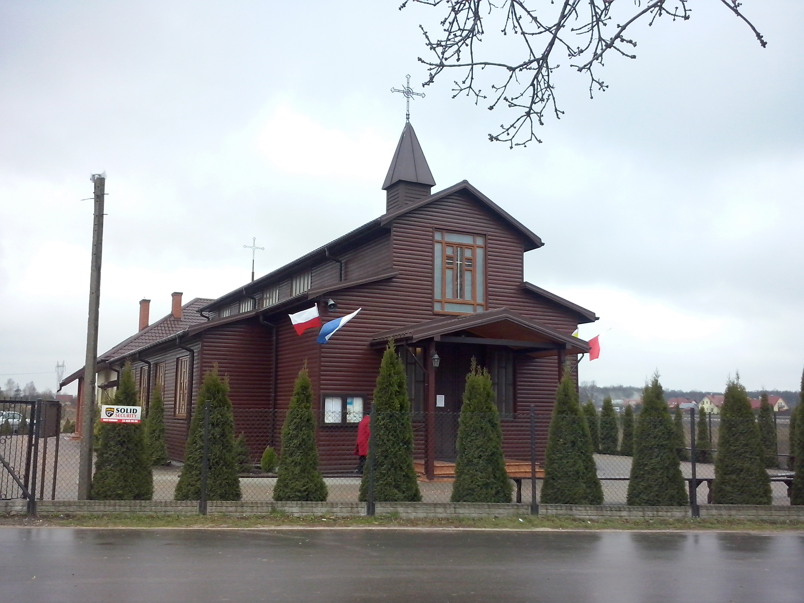 Wielgolas Brzeziński (gm. Halinów, pow. Mińsk Mazowiecki) - kościół Matki Odkupiciela